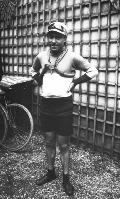 [Paris-Tours, 1913], Octave Lapize [portrait du coureur cycliste avant le départ]